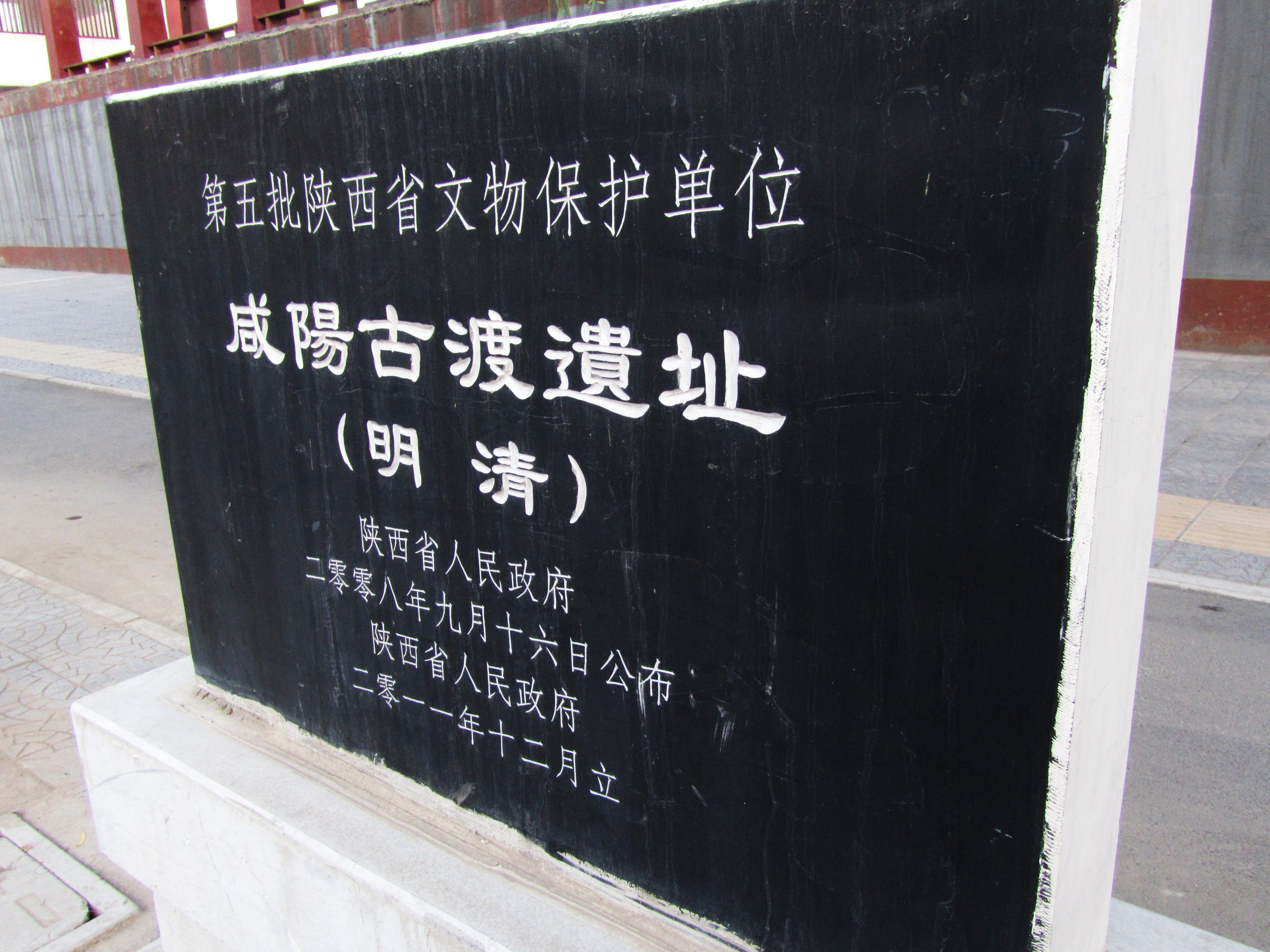 咸阳渭河北岸古渡遗址。